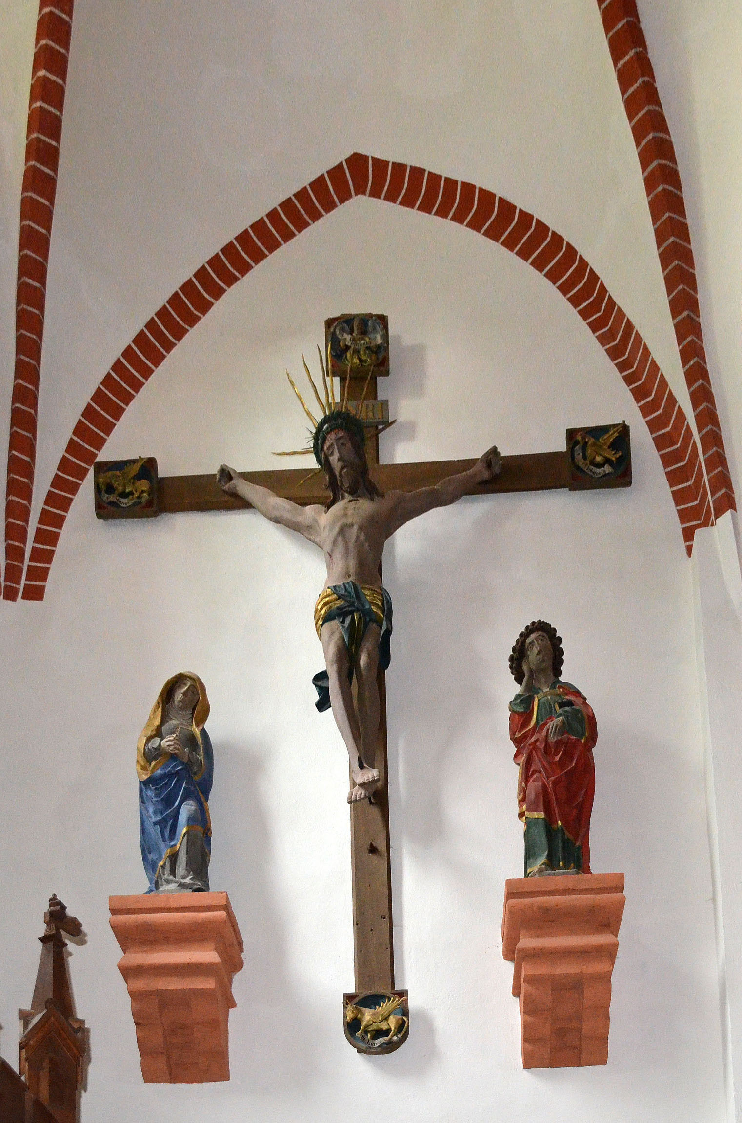 Röbel, Marienkirche, Ehem. Triumphkreuzgruppe 2. Hälfte des 15. Jh.5